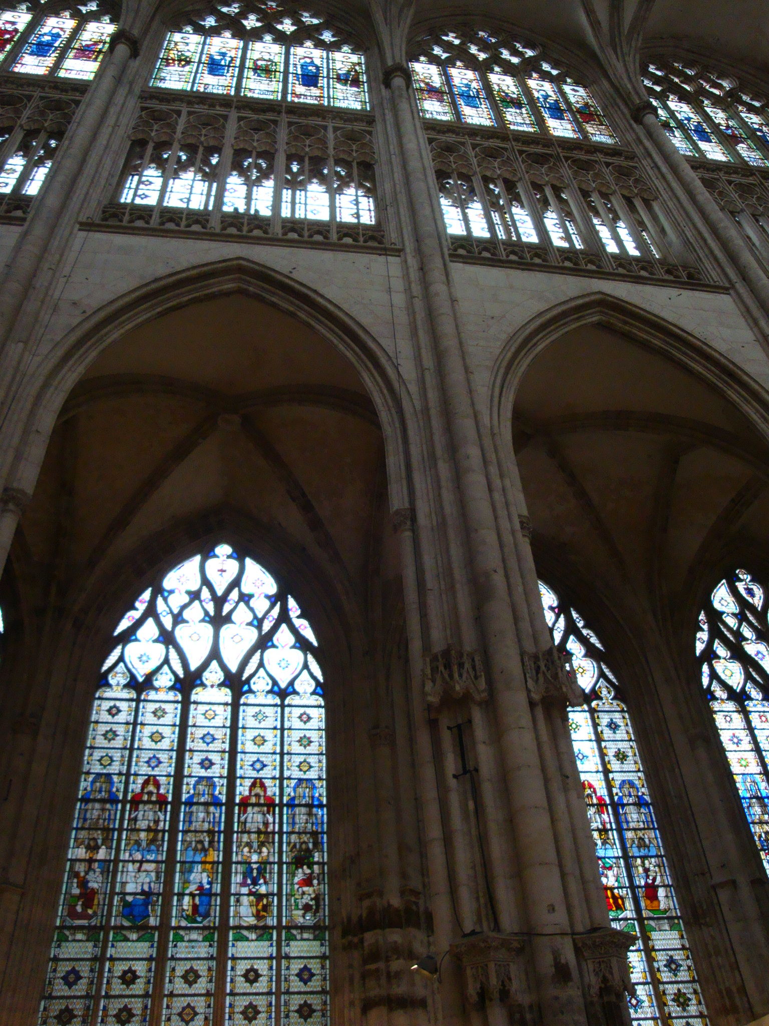 les niveaux d'élévation de la nef de l'Abbatiale Saint Ouen